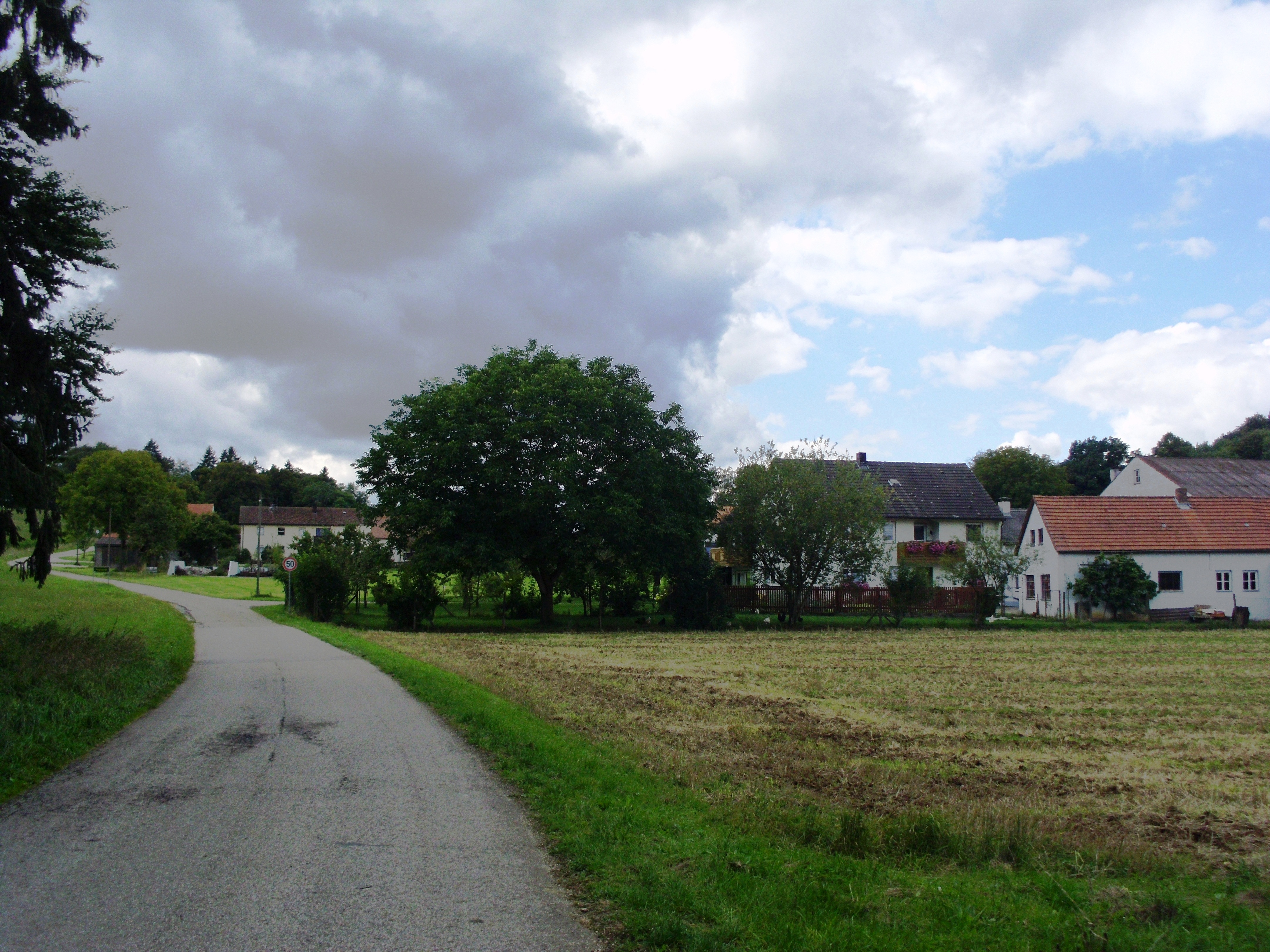 Freihardt, Ortsteil von Treuchtlingen im Landkreis Weißenburg-Gunzenhausen